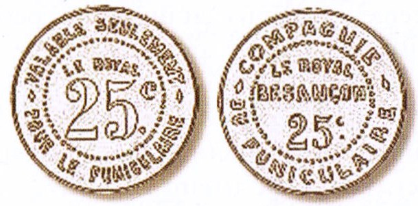 Jetons du funiculaire de Bregille.